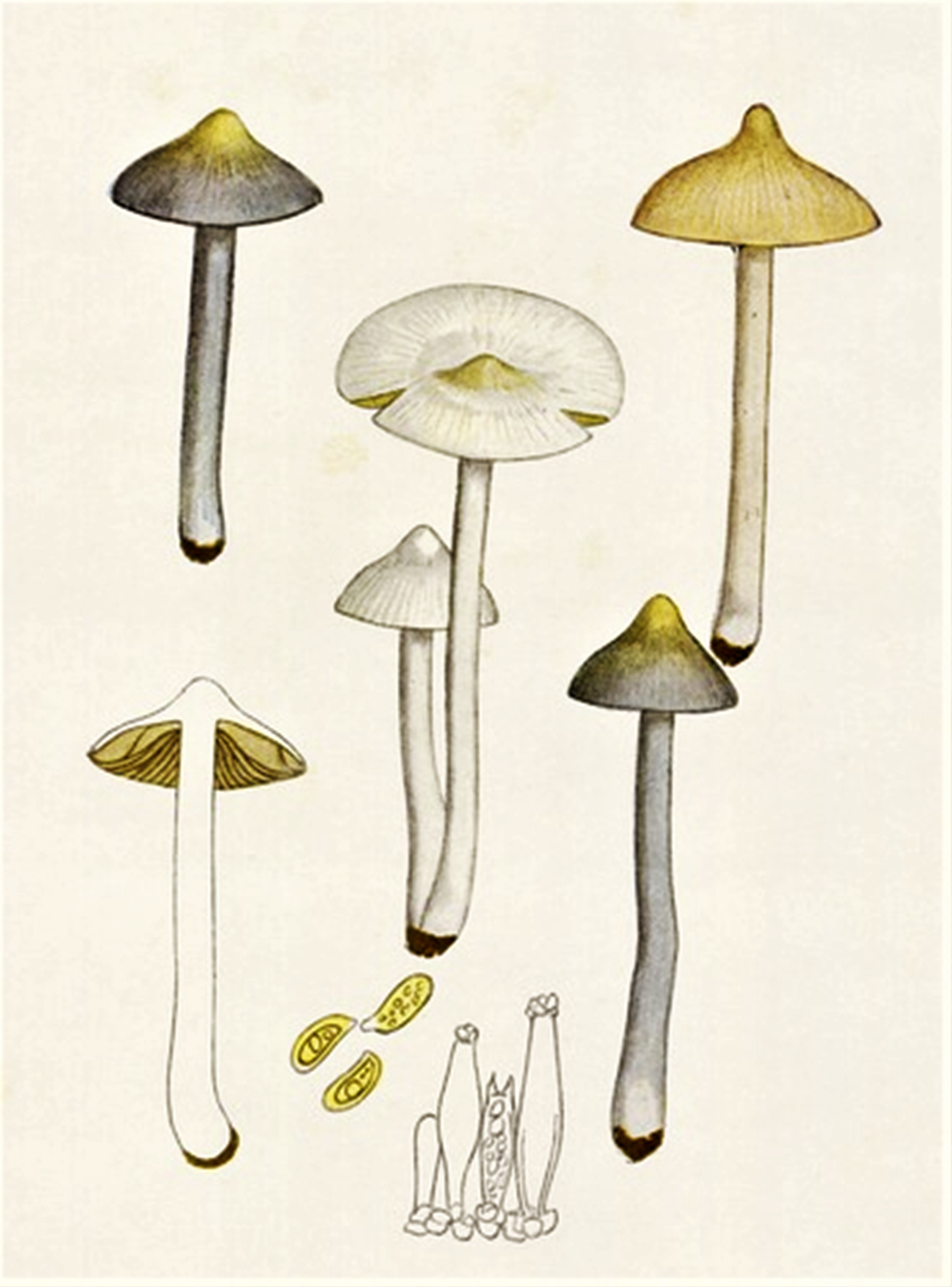 Giacomo Bresadola: Inocybe geophylla (Sowerby, 1798) P.Kumm. (1871)